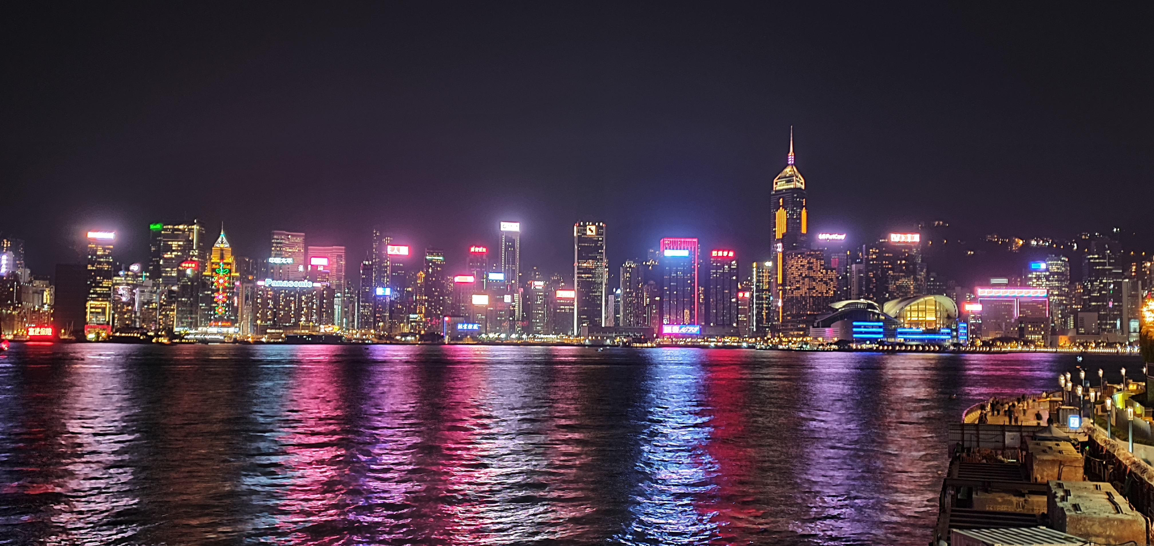 חוף קאולון במבט להונג קונג